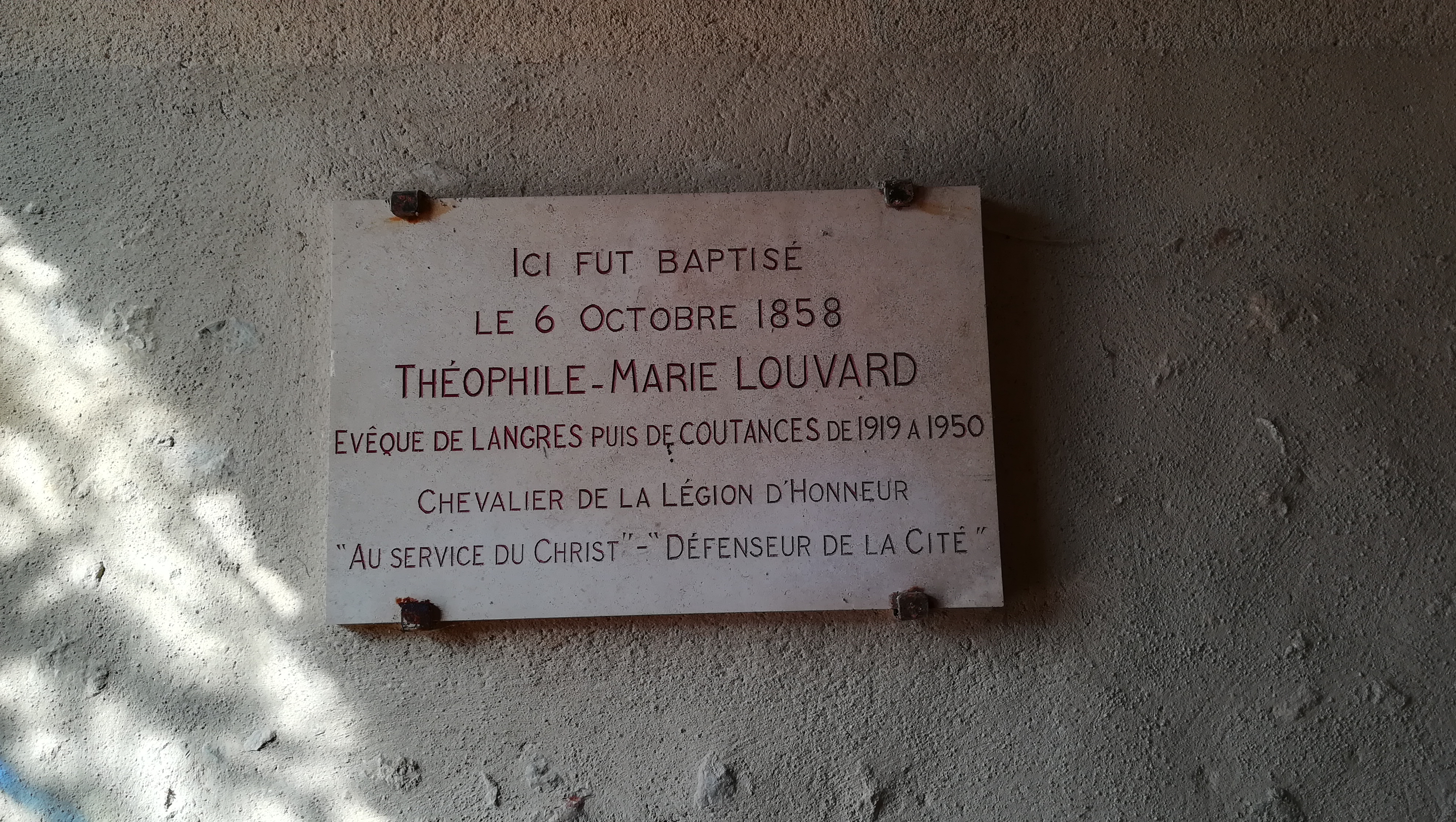 Église Saint-Martin de Radon, dans l'Orne. Plaque commémorative située à gauche dans l'entrée, avant de pénétrer dans la nef. Texte : Ici fut baptisé le 6 octobre 1858 Théophile-Marie Louvard Evêque de Langres puis de Coutances de 1919 A 1950 Chevalier de la Légion d'Honneur "Au service du Christ" - "Défenseur de la Cité"